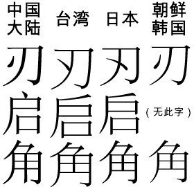 各地之间汉字的细微差异。